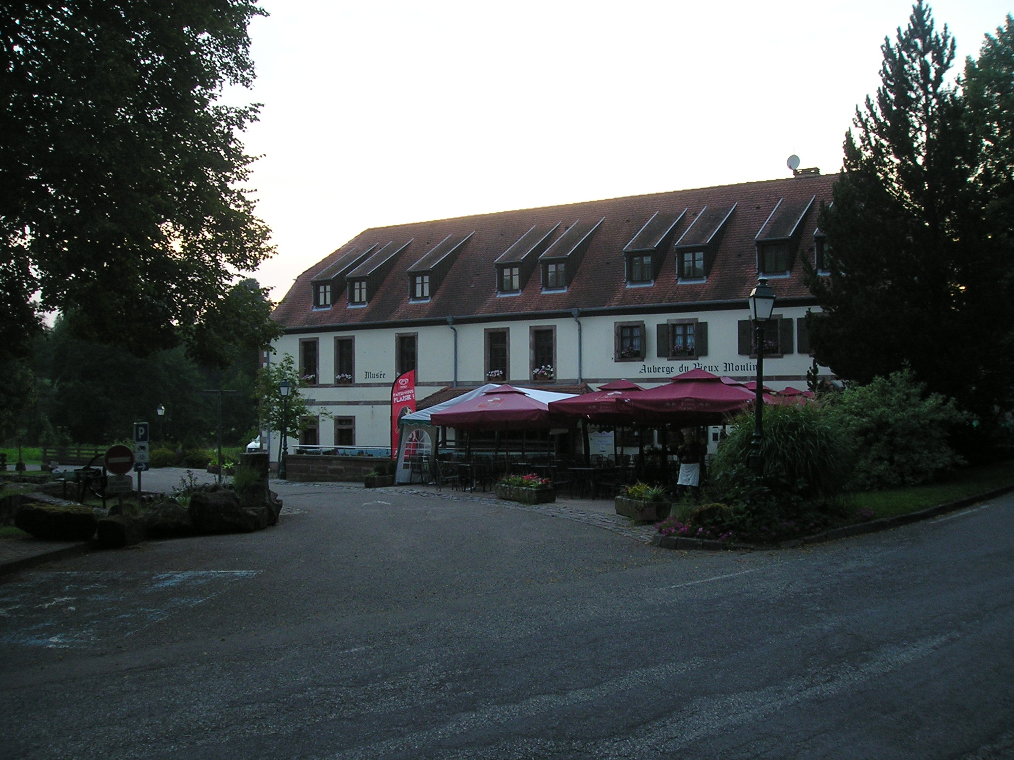 Eschviller Mühle mit Museum und Restaurant